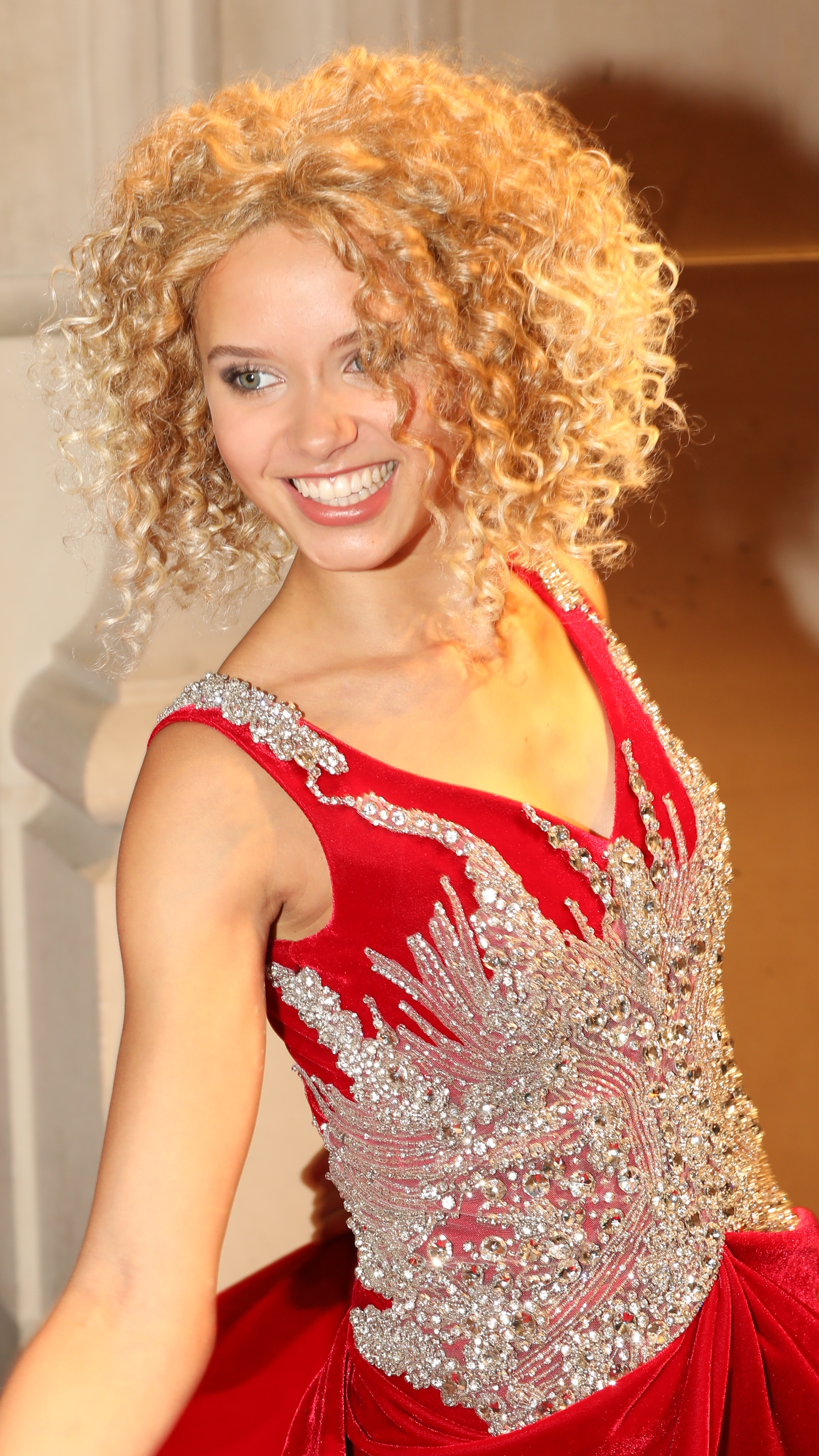 Taynara Wolf beim Hessischen Film- und Kinopreis 2017